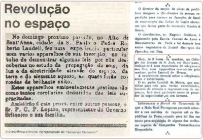 Parte do setor de um jornal do começo do século XX